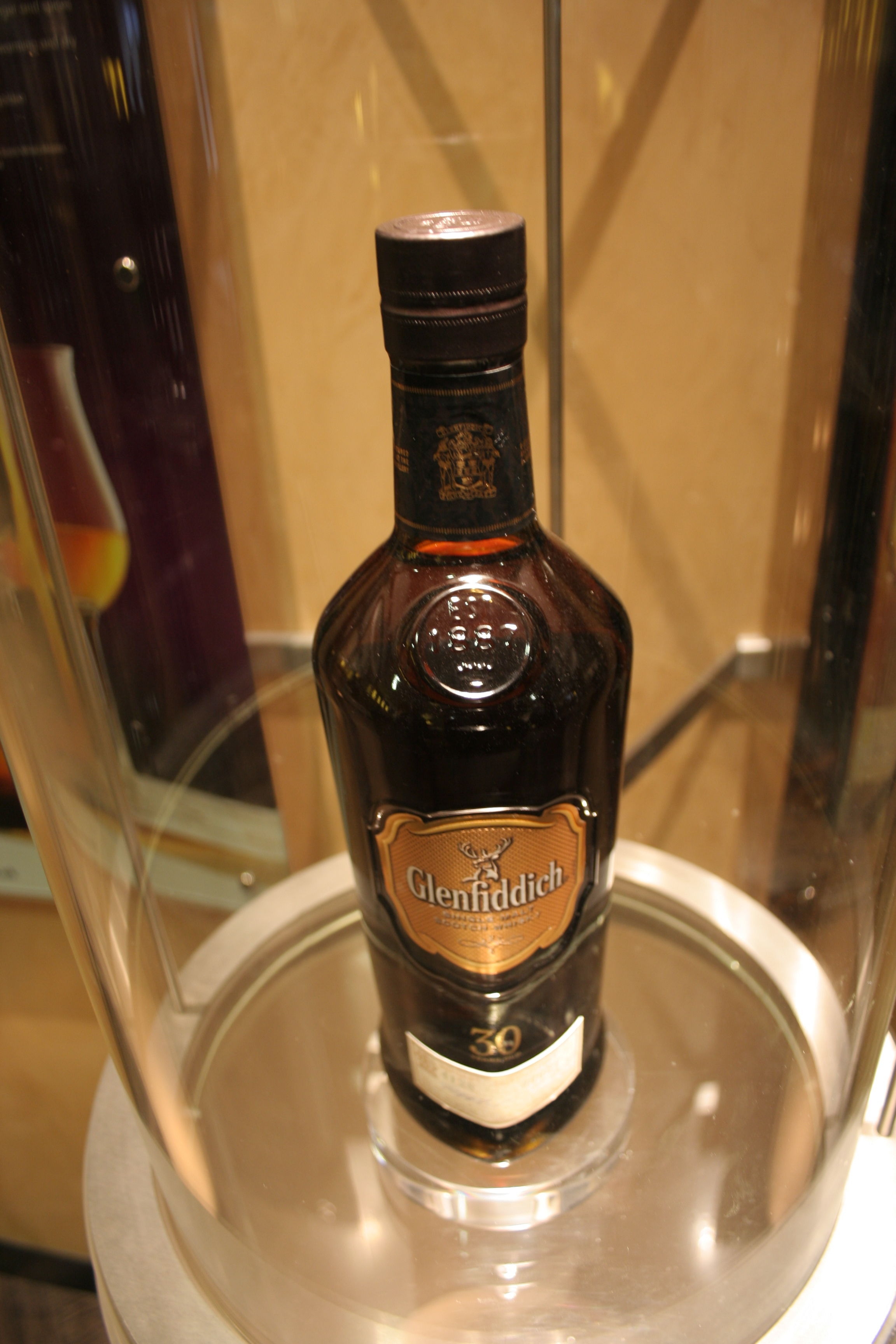 Visite de la distillerie de wisky Glenfiddich